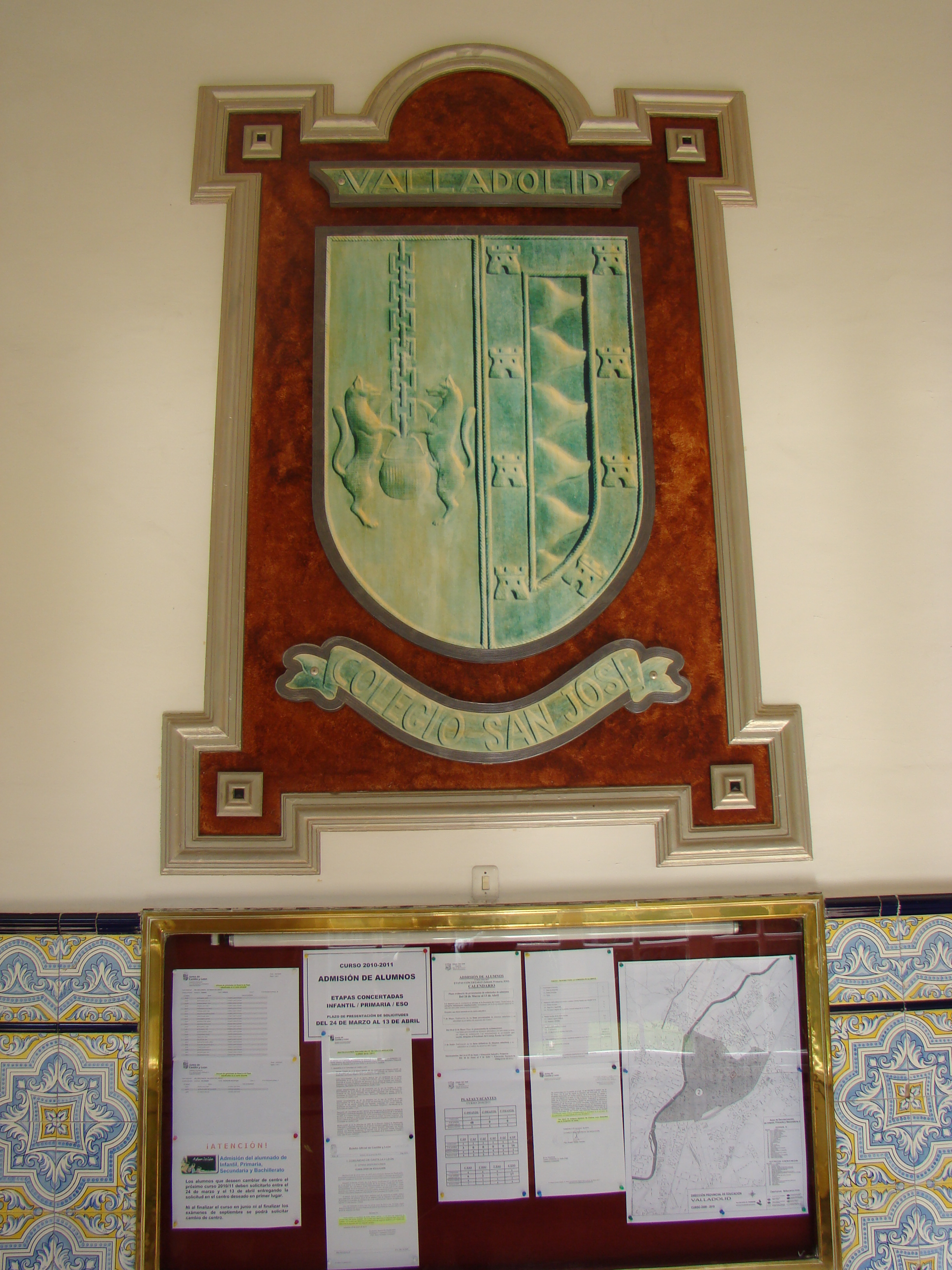 Colegio de San José en Valladolid (España). Su escudo esta dividido en dos cuarteles, primero: una caldera colgada de un llar sostenida por dos lobos, y segundo, las llamas representativas del escudo de Valladolid.